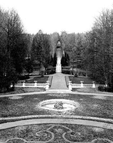 Вид на пейзажный парк с балкона усадебного дома в Рай-Семеновском